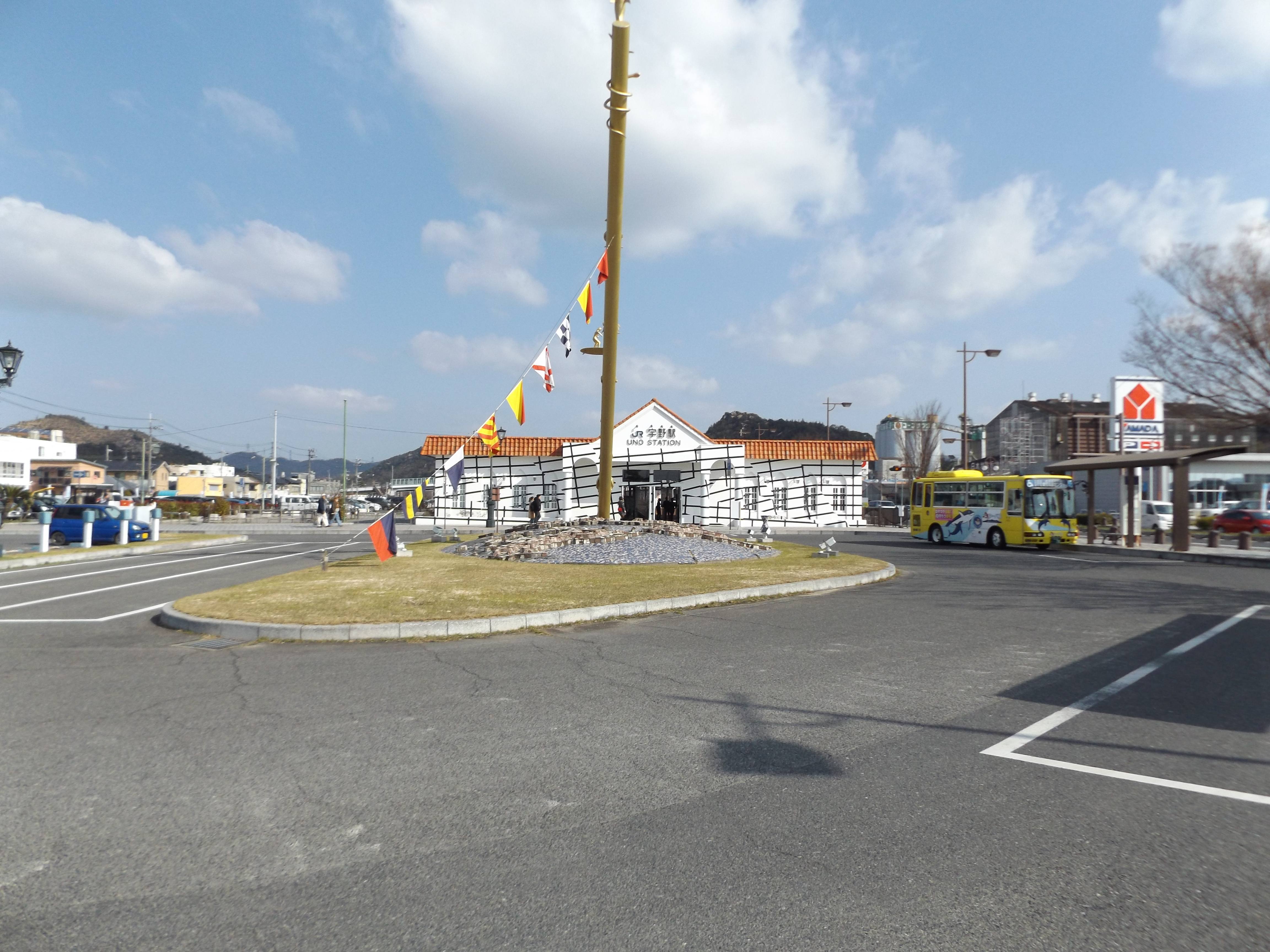 岡山県玉野市にある西日本旅客鉄道（JR西日本）宇野線（宇野みなと線）宇野駅。瀬戸内国際芸術祭2016の作品の一つとしてイタリア人アーティストのエステル・ストッカーによりアート化された。